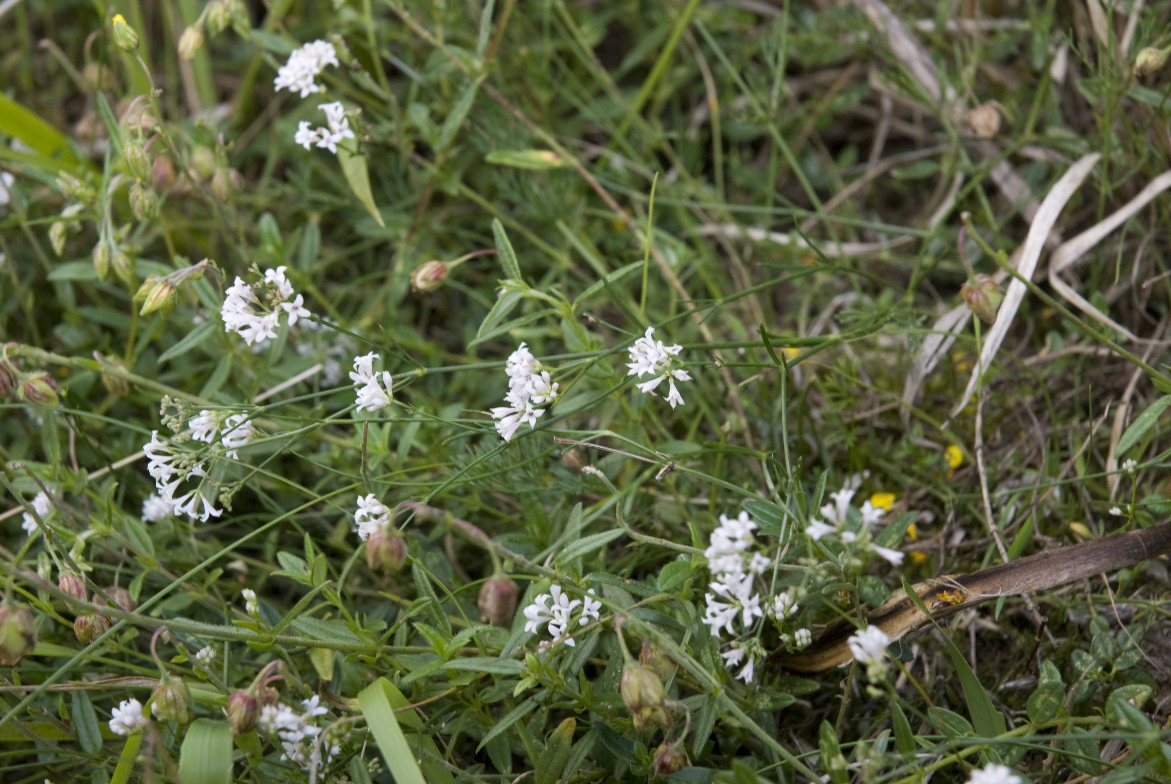 Asperula cynanchica Bethisy-Saint-Martin (Oise), France